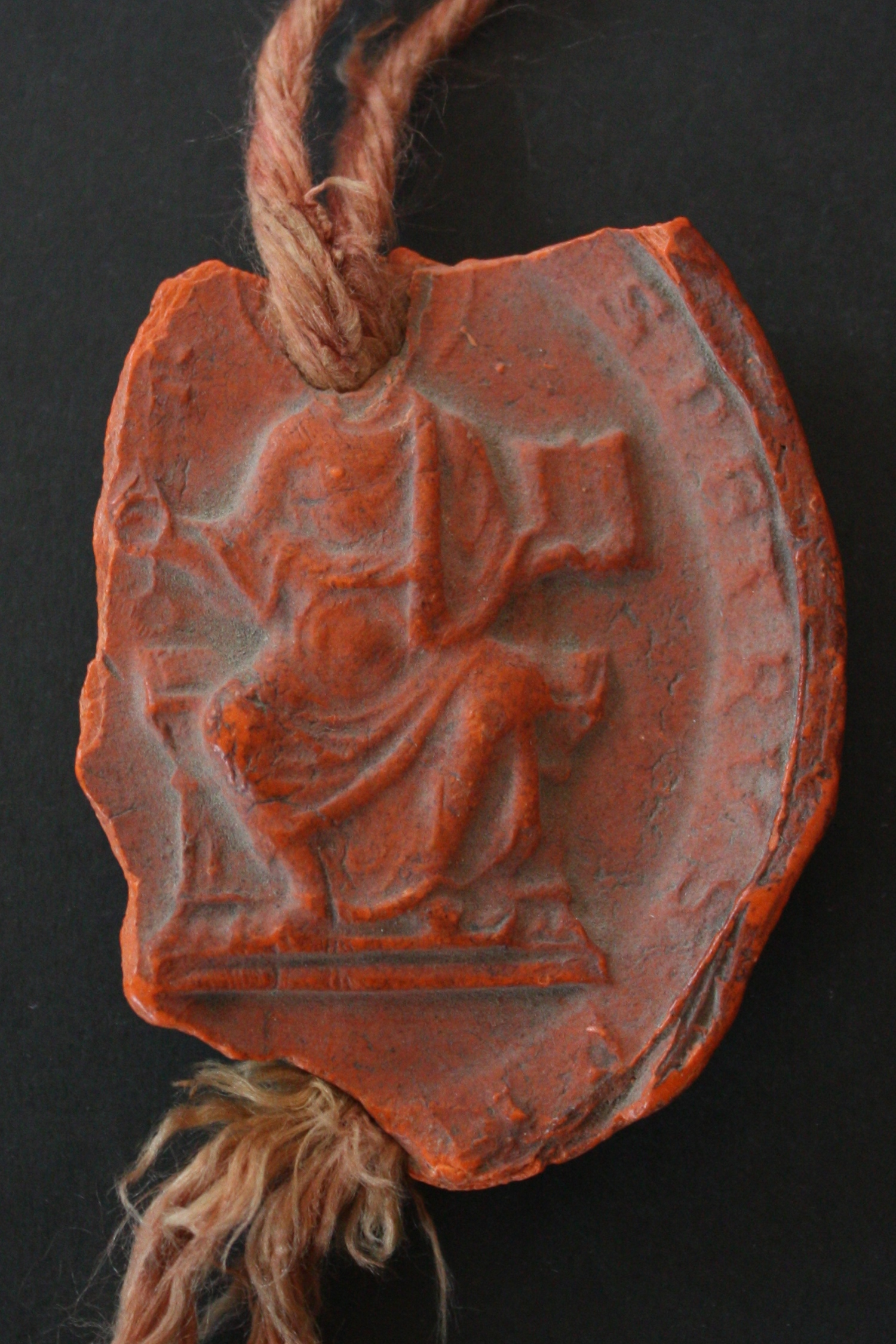 Kloster Eberbach: Urkunde über einen Erwerb am Steinberg 1217. Siegel des Konvent des Stifts Sankt Peter in Mainz Eberbach Abbey Native nameKloster EberbachLocationEltville am Rhein, GermanyCoordinates50° 02′ 31.93″ N, 8° 02′ 51.26″ E Established1136Website